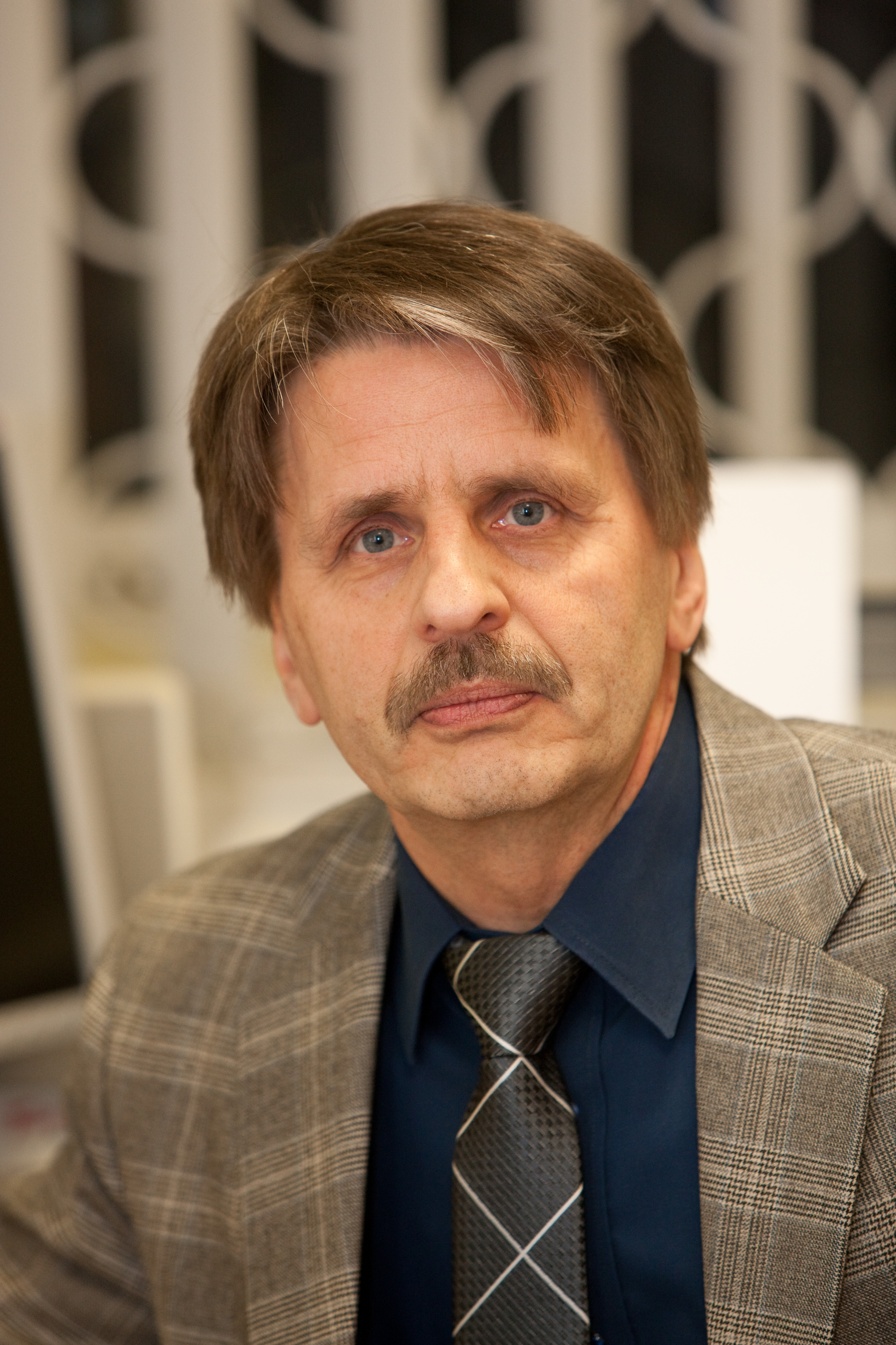 Väino Sammelselg